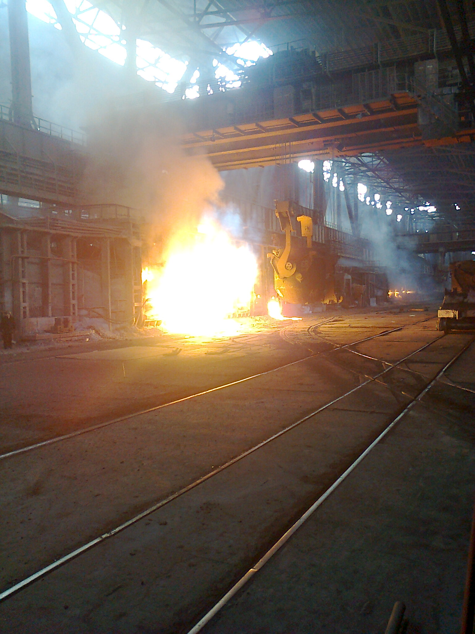 Мартеновская печь ММК им.Ильича (Ныне закрыта)